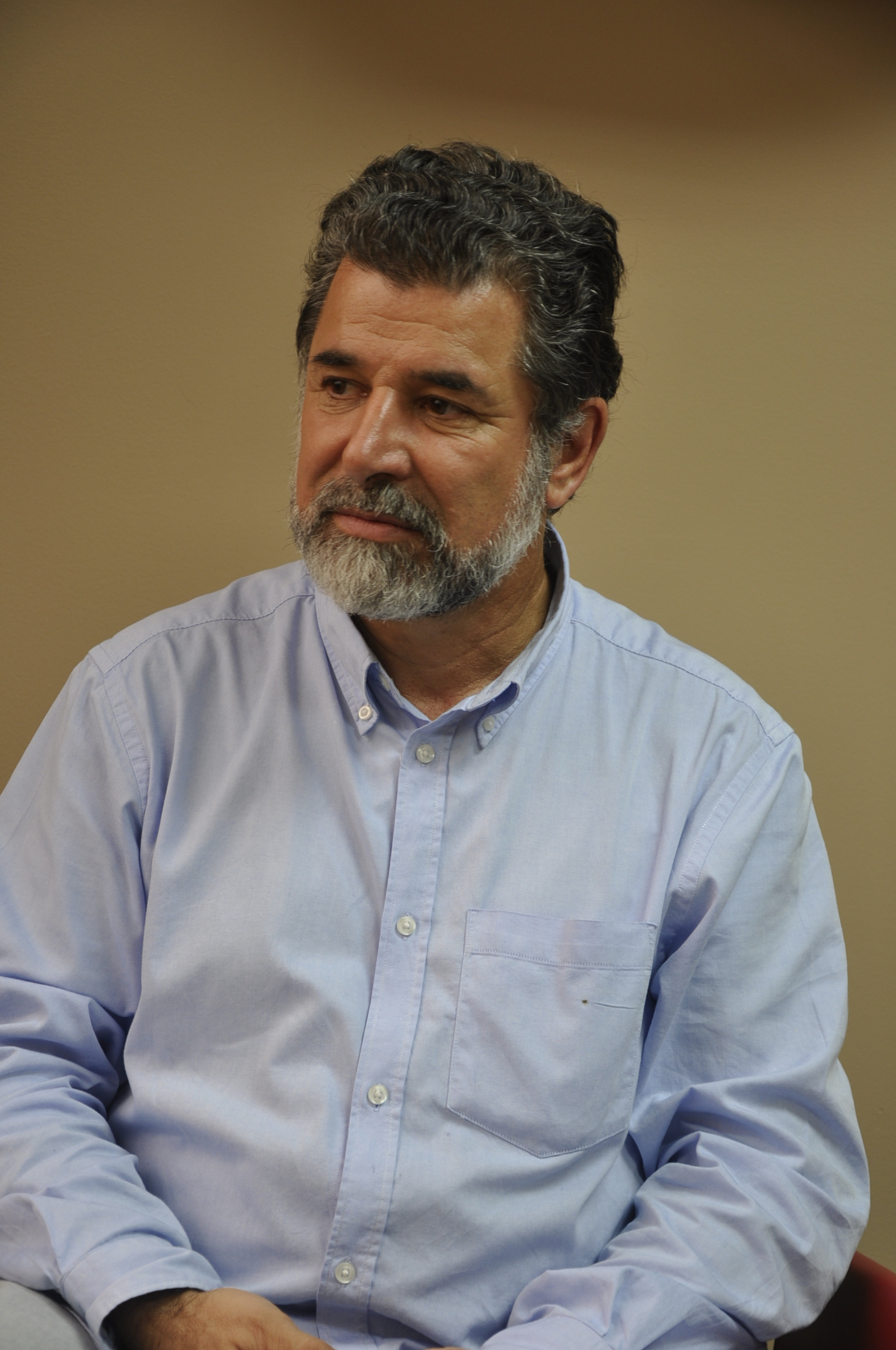 Ibo Bonilla (Sarchí (Alajuela), 1951), arquitecto y escultor de Costa Rica.